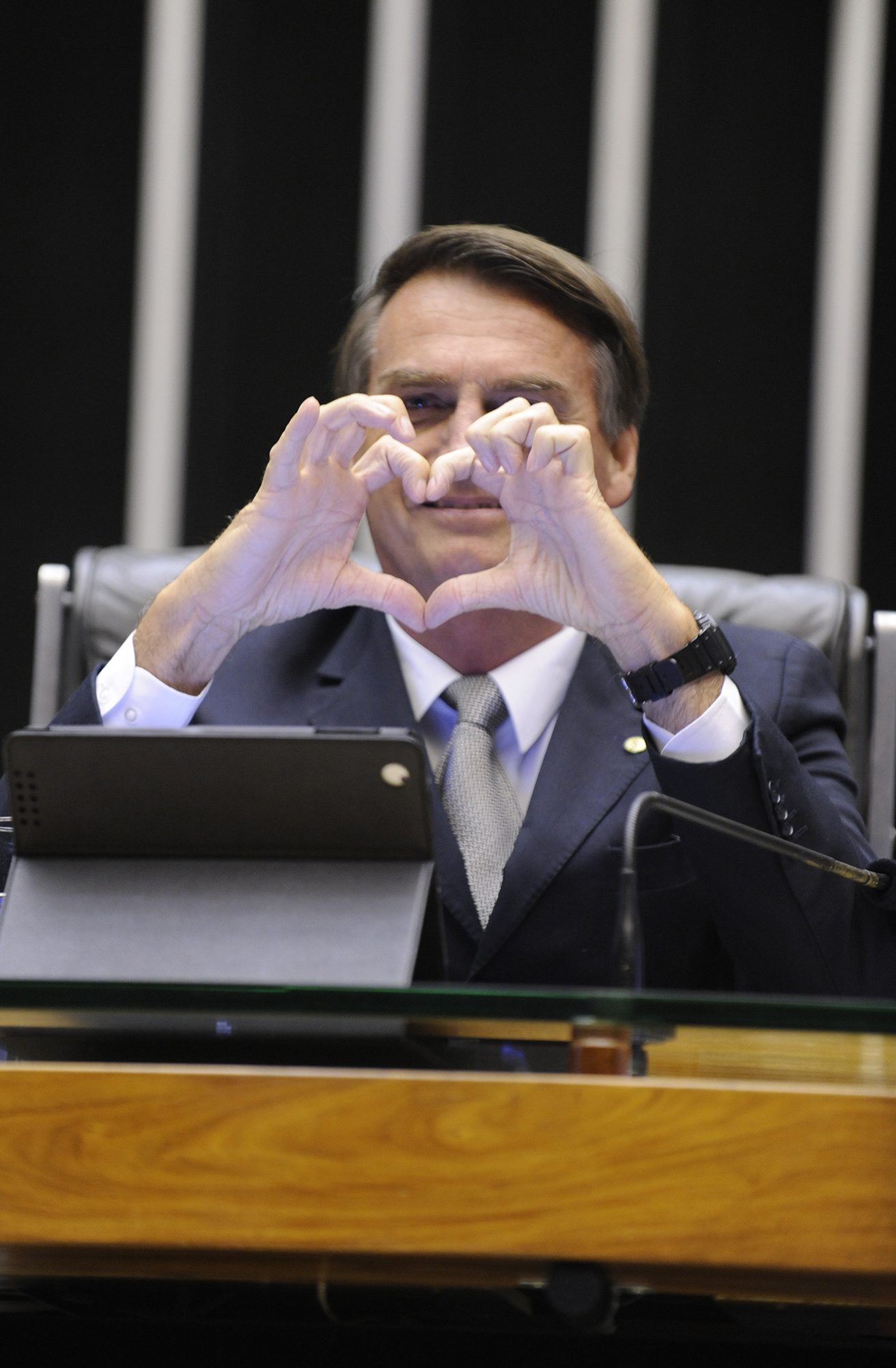 Sessão para votar o pedido de cassação do mandato do deputado André Vargas (sem partido-PR). Dep. Jair Bolsonaro (PP-RJ)